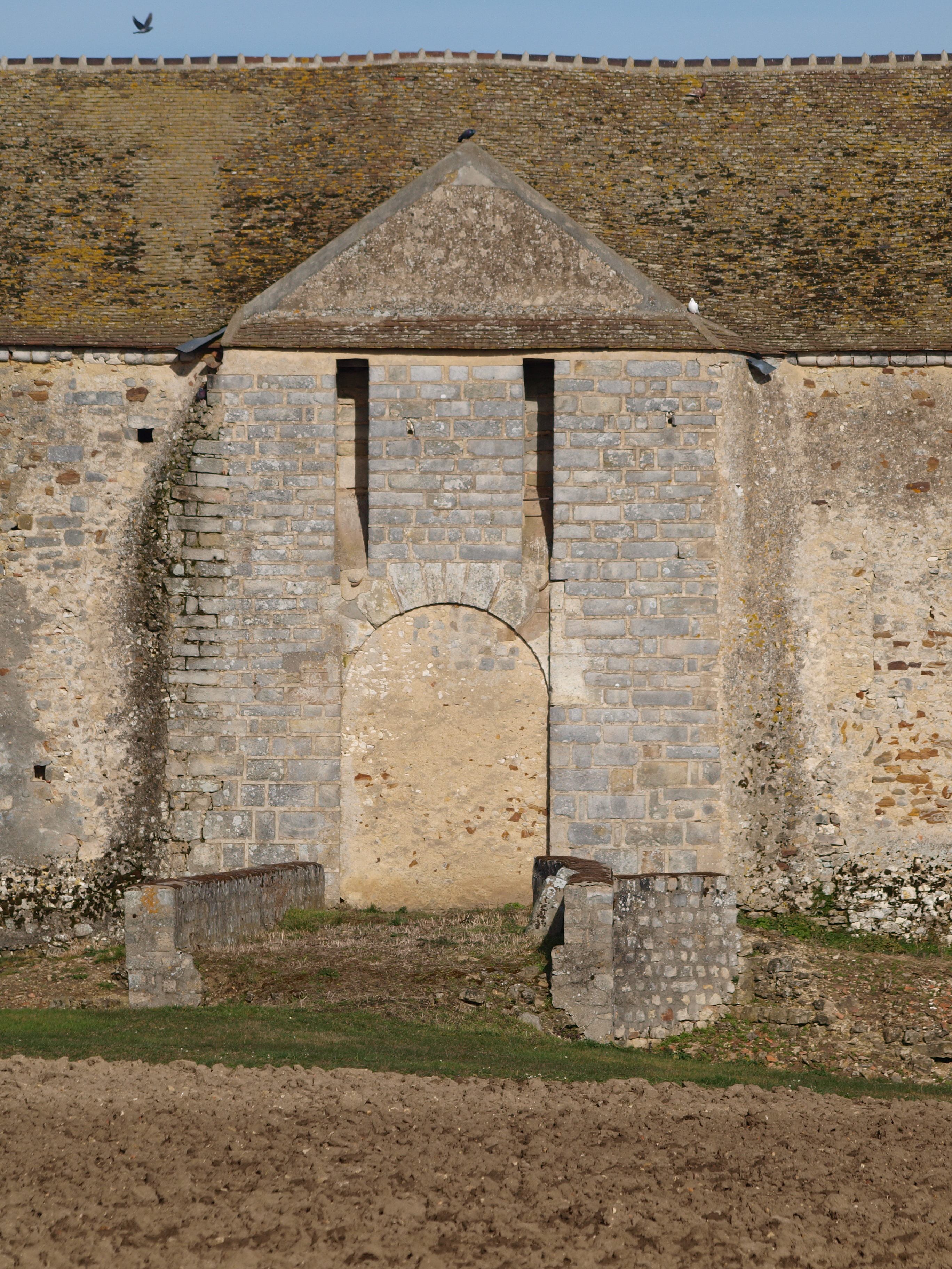 Esmans (Seine-et-Marne, France)